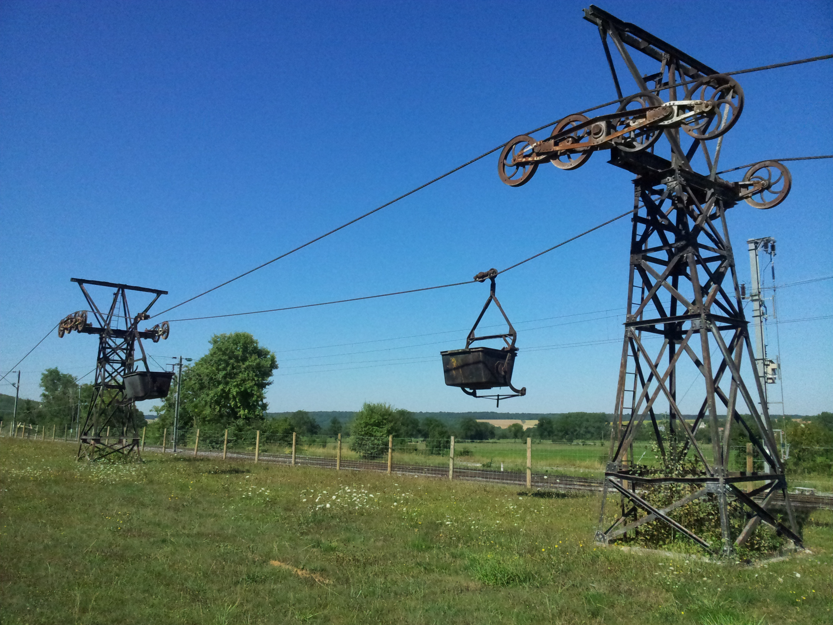 Vue d'ensemble d'une partie de l'ancien transporteur aérien Maxéville-Dombasle exposé à l'entrée de la carrière Solvay de Saint-Germain-sur-Meuse (deux pylônes et deux bennes).